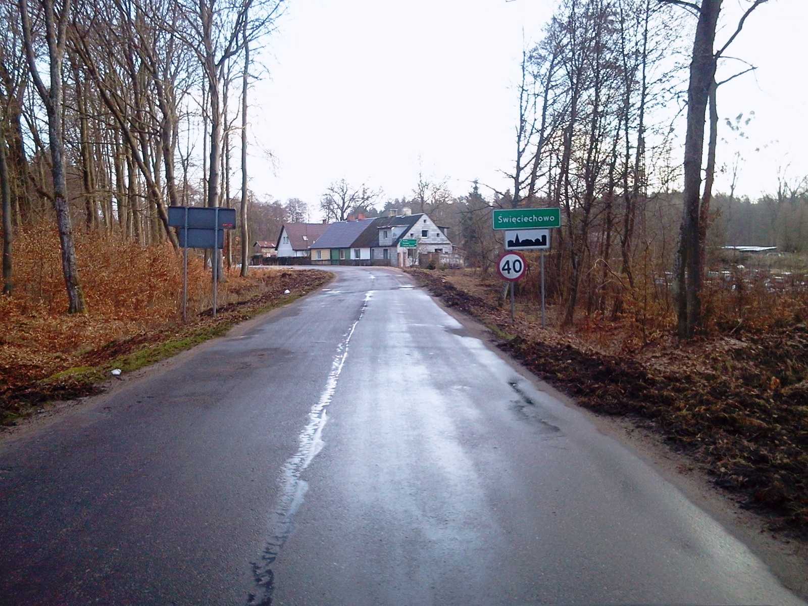 Święciechowo - widok